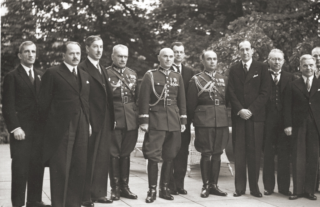 Polish Government under Prime Minister Felicjan Sławoj Składkowski 1936